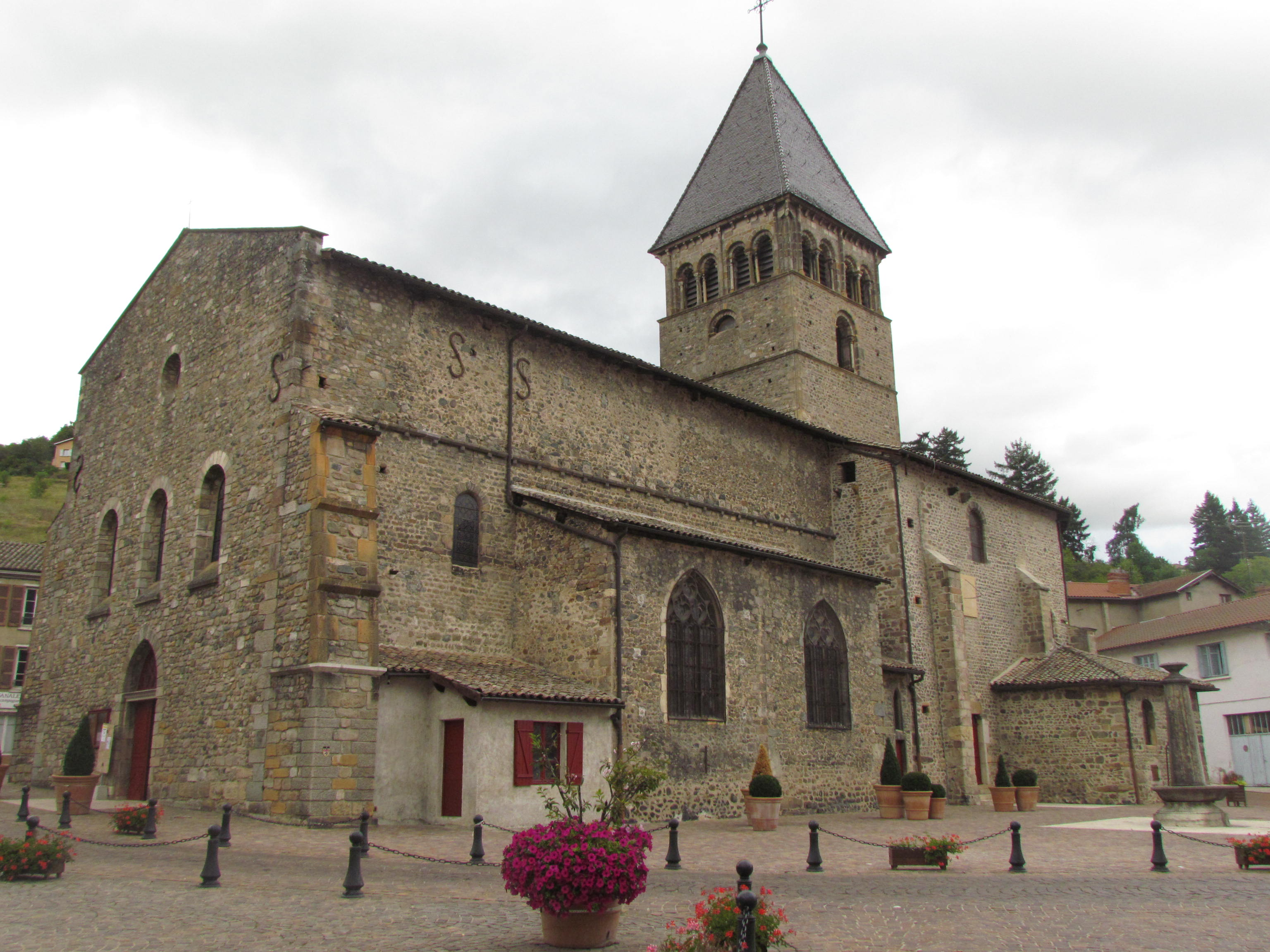 Eglise Saint-Nicolas .